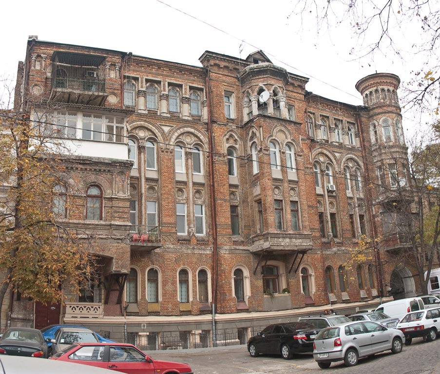 Украина (Україна): обл.Одесская (обл.Одеська): Одесса (Одеса): р-н Приморский: ул.Спиридоновская,8; 13:34 03.11.2008